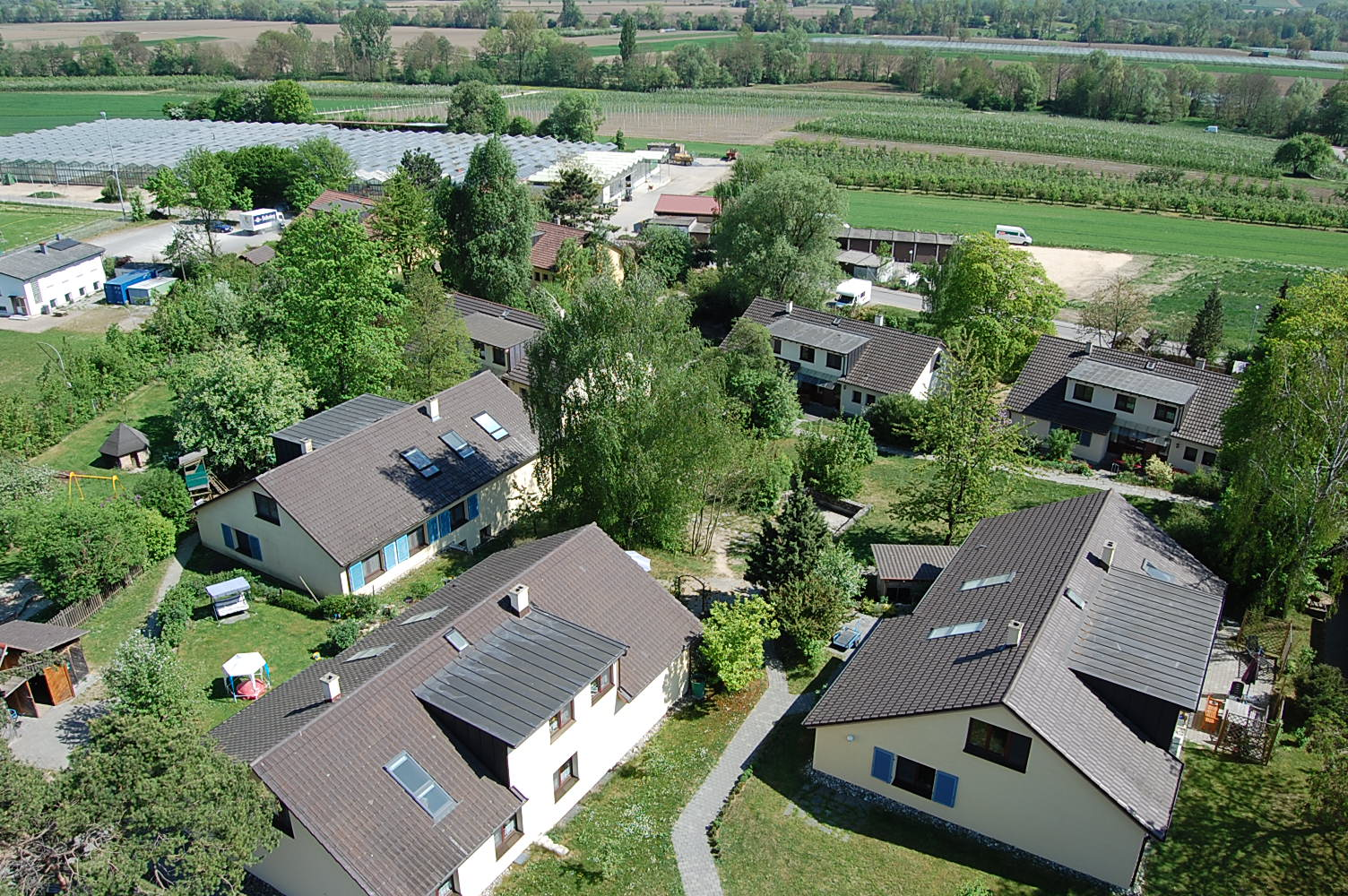 Die Familienhäuser im Pestalozzi Kinderdorf Stockach-Wahlwies